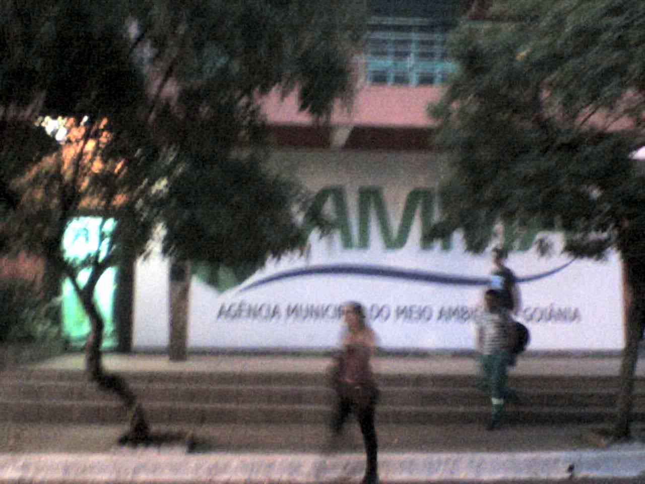 Sede da Agência Municipal de Meio Ambiente, em Goiânia, Goiás.